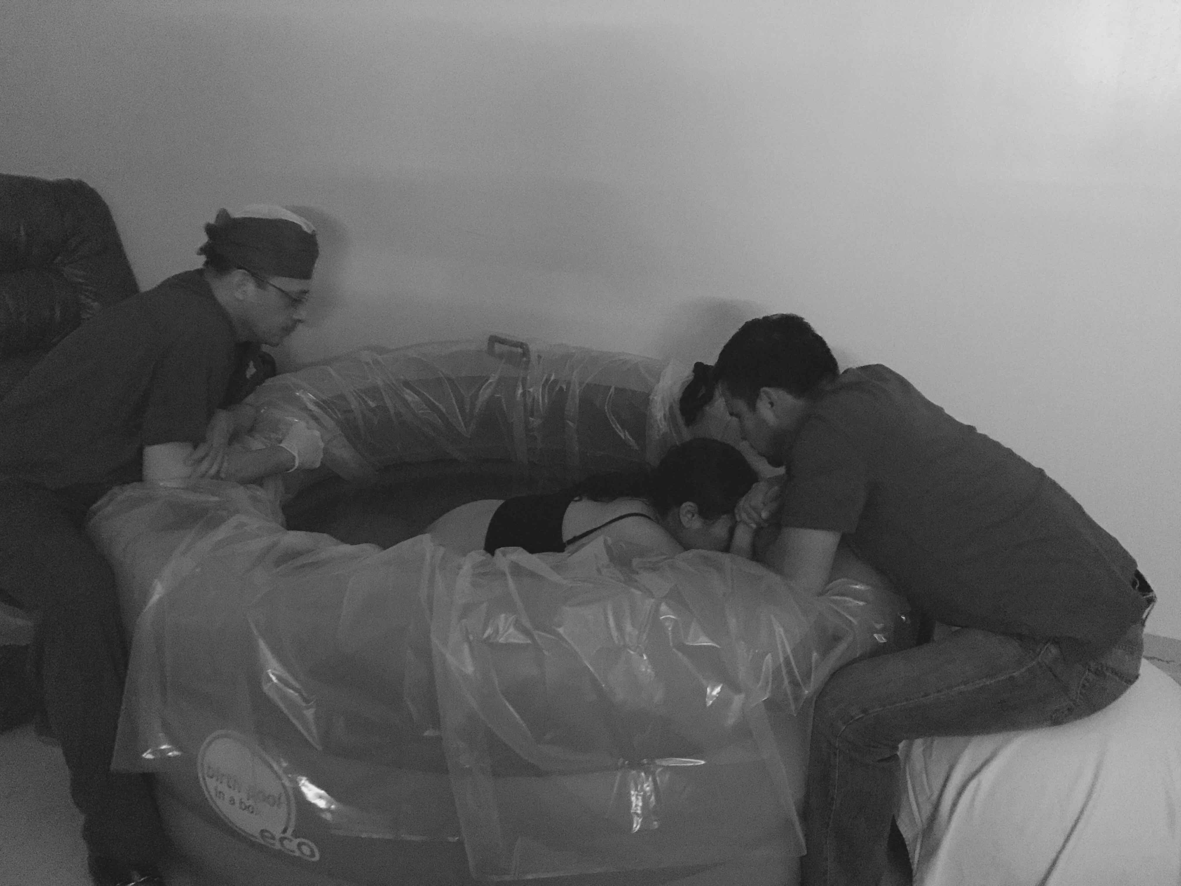 El parto en agua debe ser la máxima expresión del nacimiento espontáneo, fisiológico, respetado y humanizado. El agua caliente es excelente método para aliviar el dolor en labor y se recomienda para el primer periodo del trabajo de parto, es necesario un profesional con gran paciencia, empatía y habilidad para monitorear el bienestar materno fetal con la mínima intervención posible.